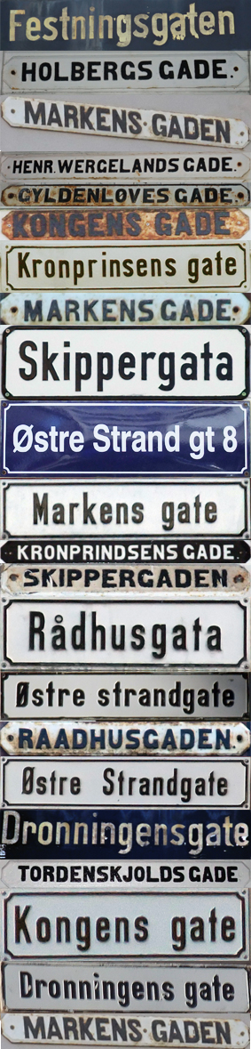 Gateskilt fra kvadraturen (Kristiansand)